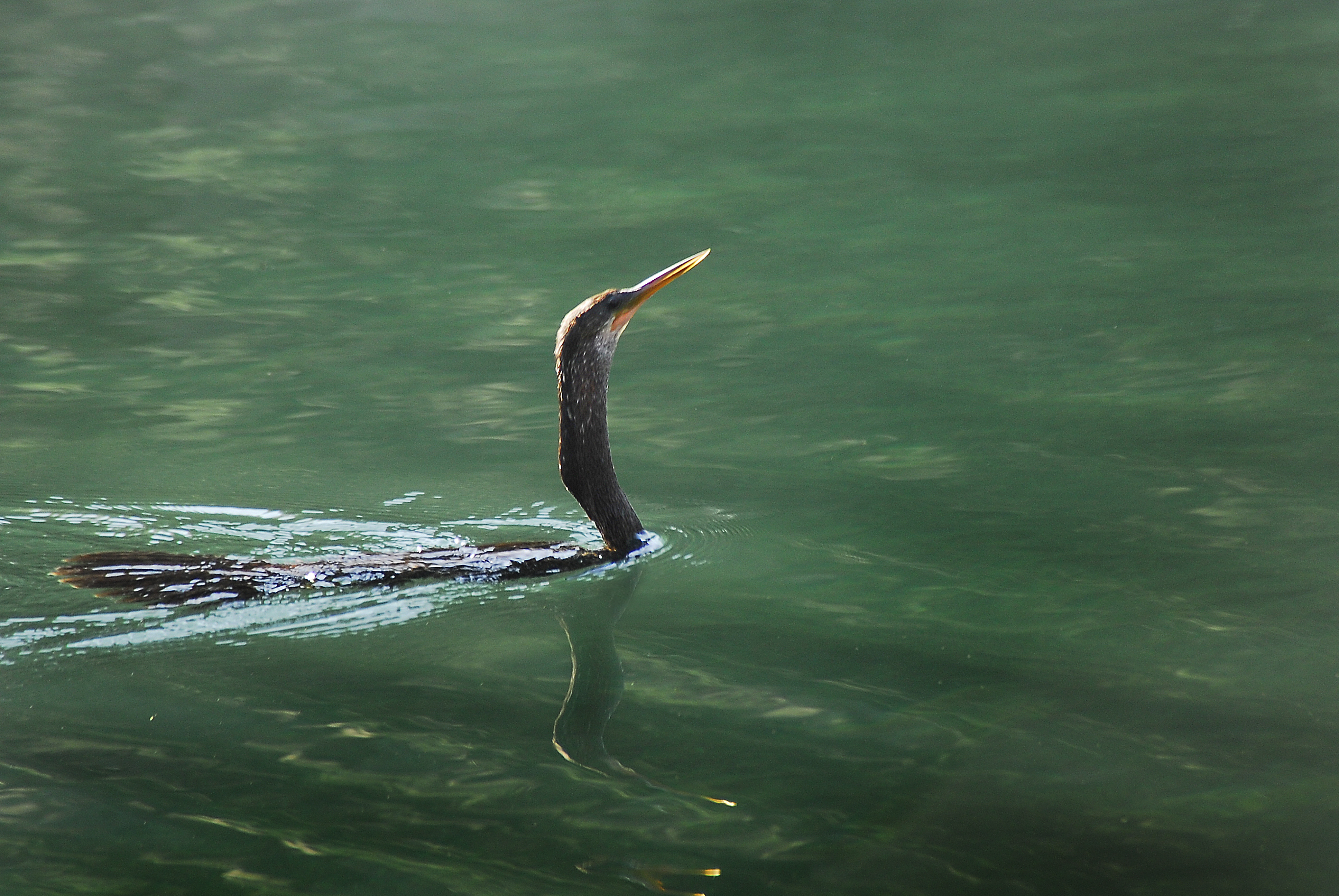 Anhinga swimming at Gemini Springs